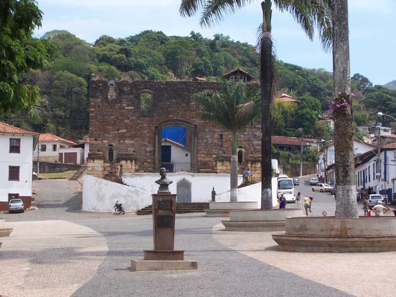 Igreja do Rosário em Sabará - MG, Brasil.